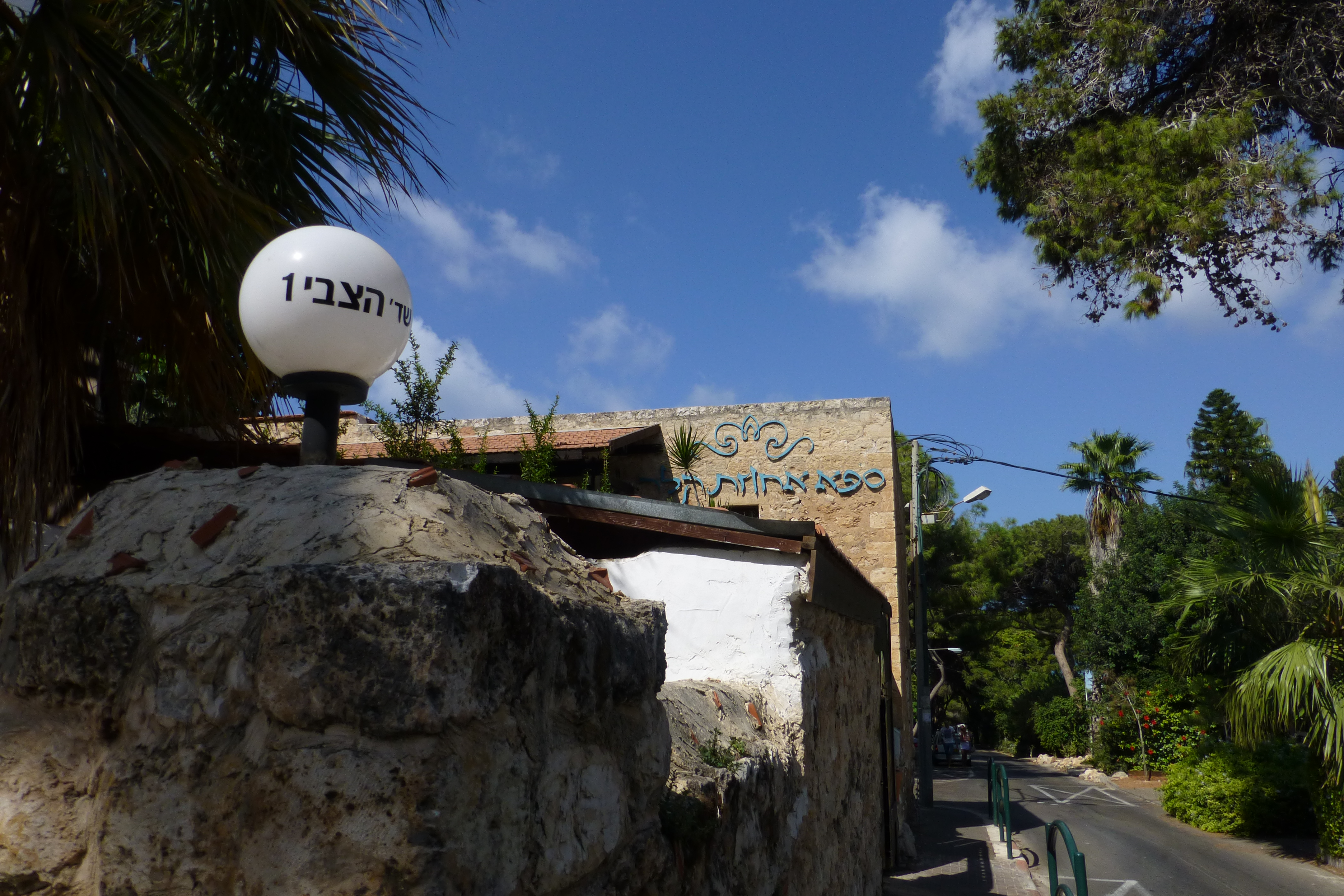 מרכז הכרמל, חיפה